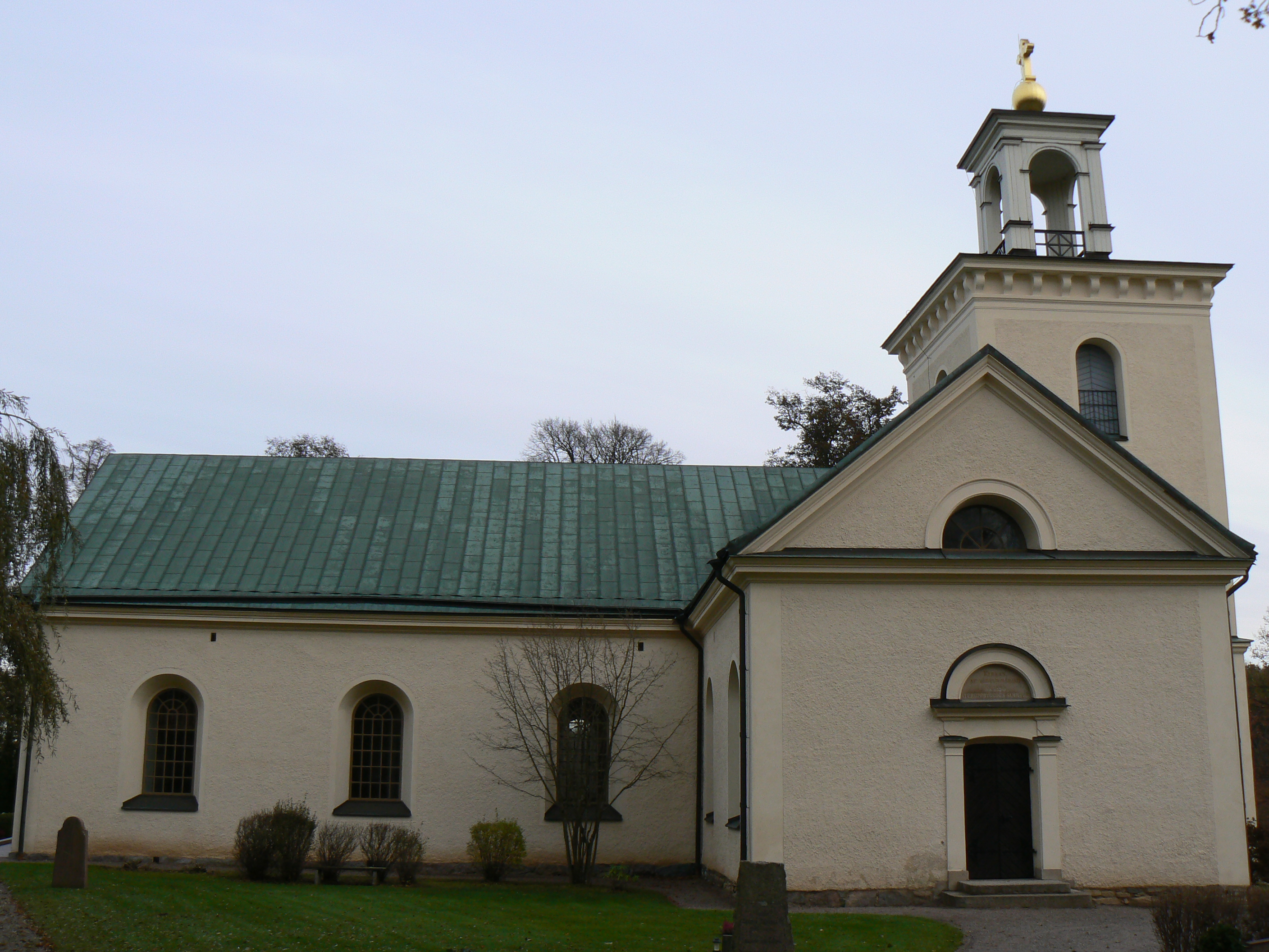 Kärna church in Malmslätt ouside Linköping, Sweden. Photo by Skvattram 2006-11-10.